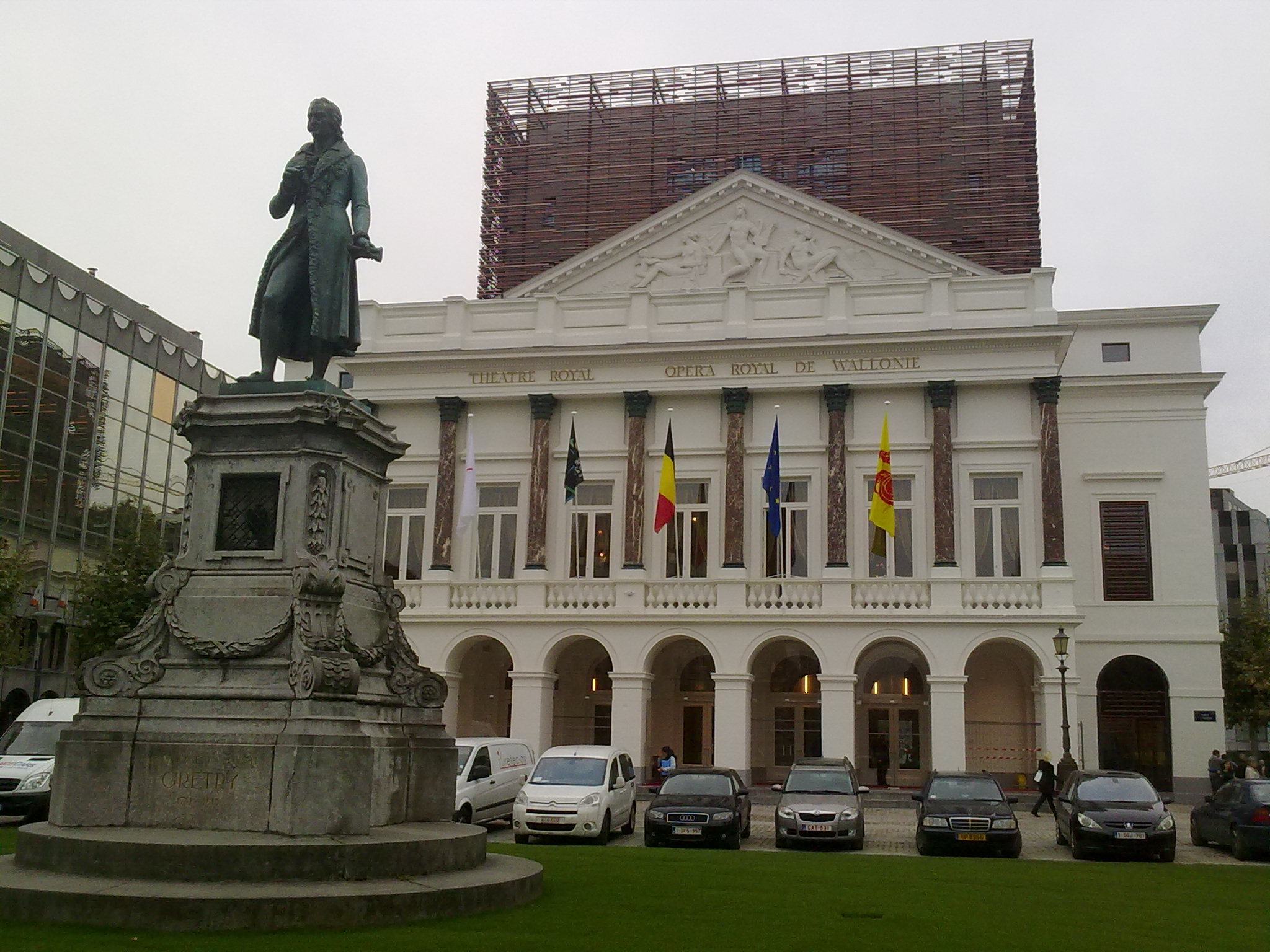 Opéra Royal de Wallonie à Liège et statue d'André Grétry après la rénovation de 2009-2012.